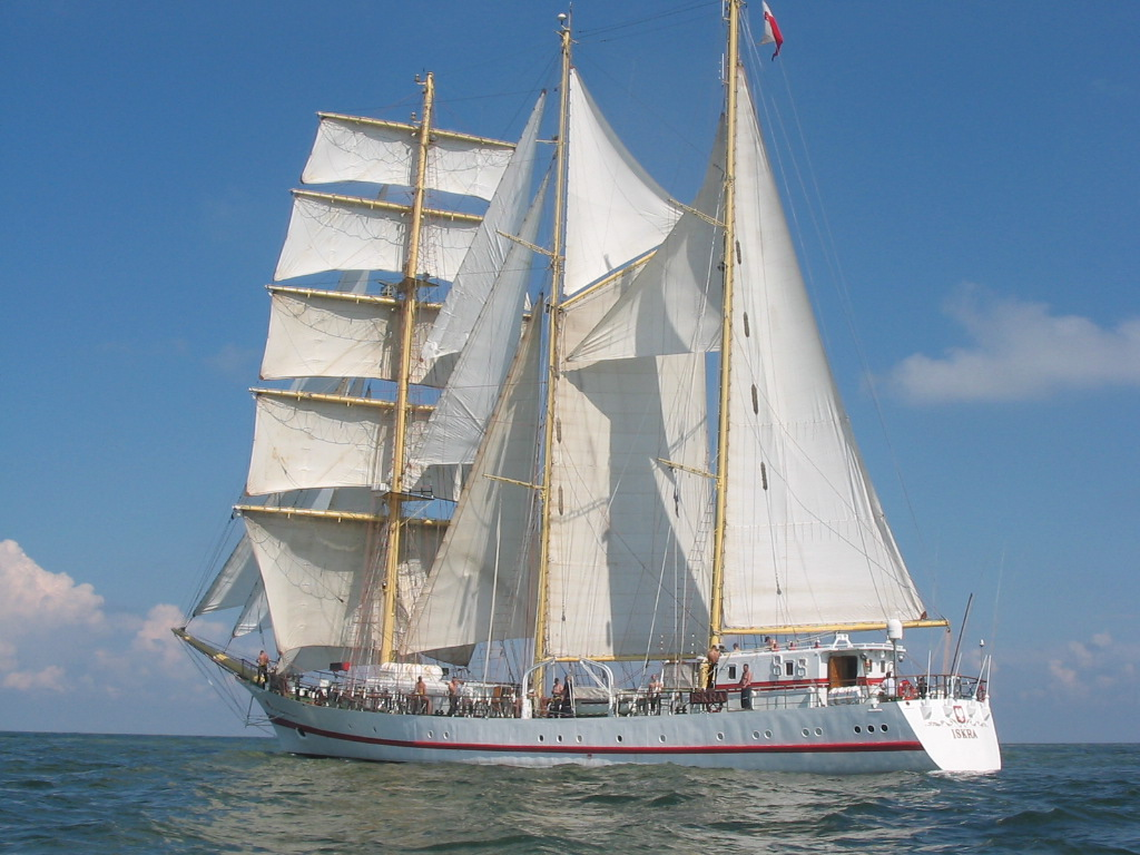 ORO Iskra lewa burta